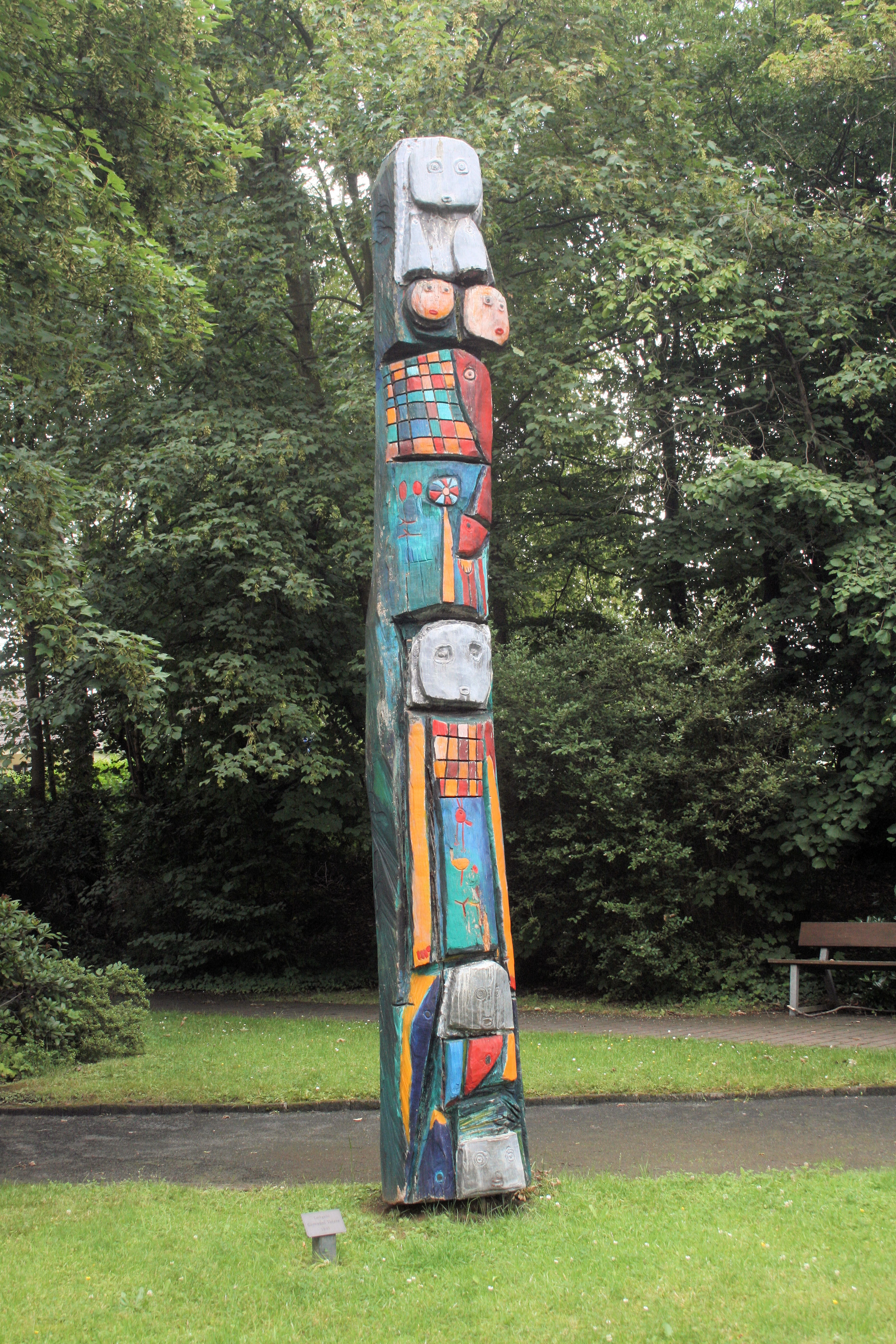 Öffentlich ausgestelltes Werk des Künstlers am Gemeindekrankenhaus Eitorf von Giovanni Vetere